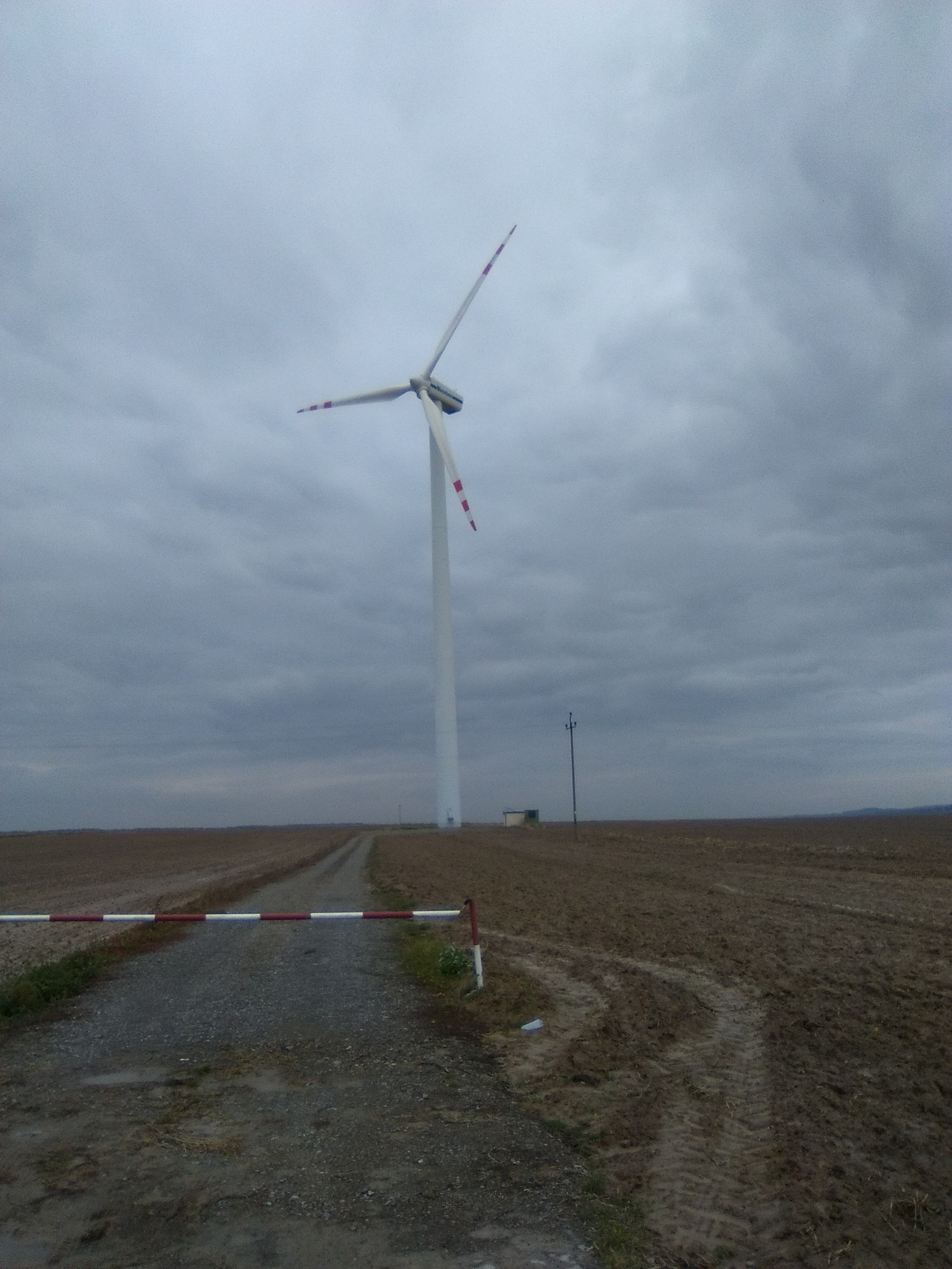 Jeden z wiatraków wyprodukowanych przez firmę Vestas należących do elektrowni wiatrowej w Żółkiewce k. Lublina